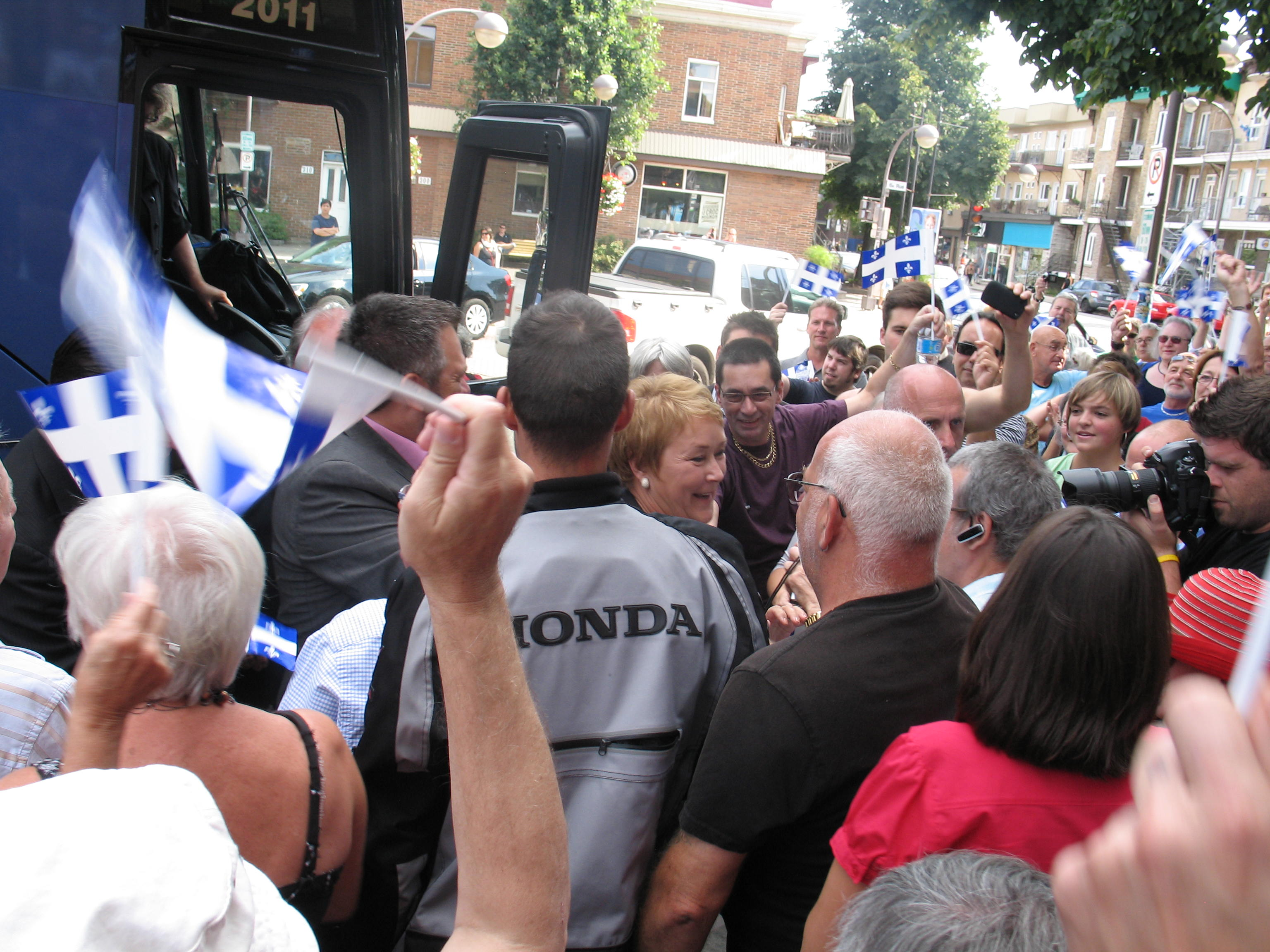 Pauline Marois participe à un événement partisan dans le quartier Limoilou de Québec à la veille de l'élection générale québécoise de 2012.